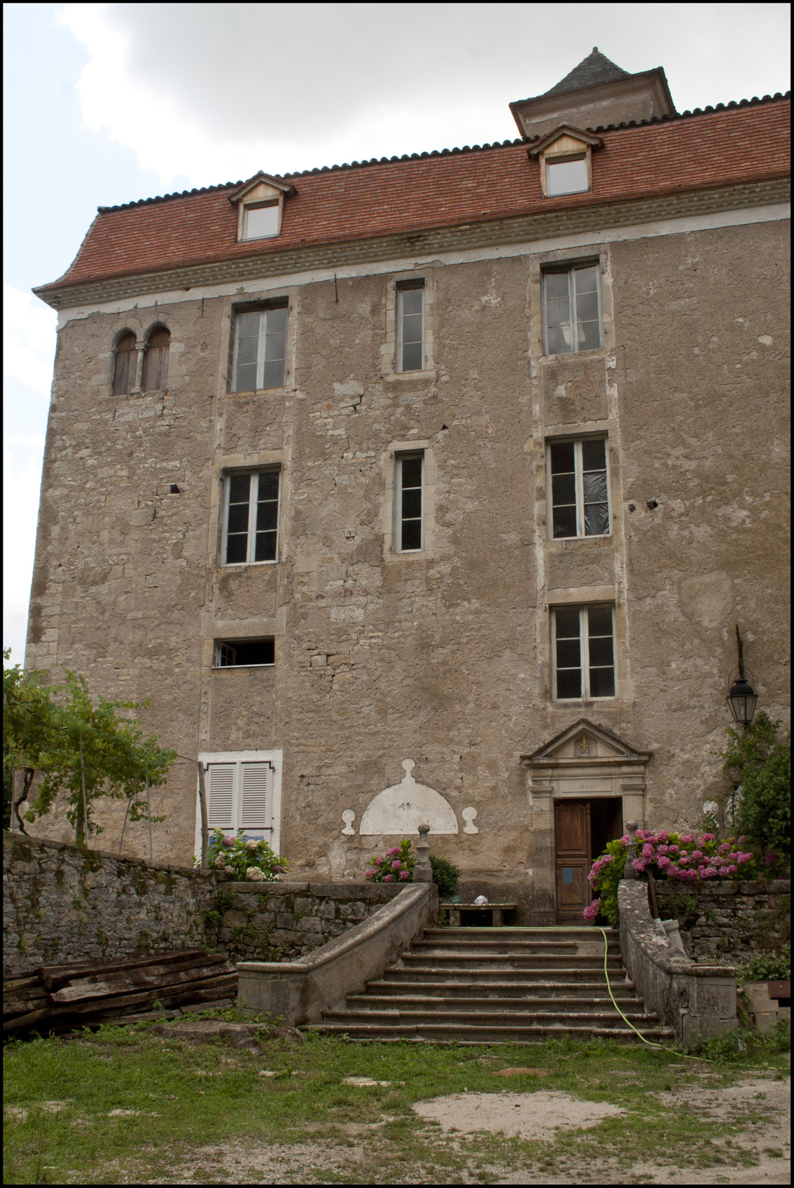 Château de Larnagol (Inscrit) .